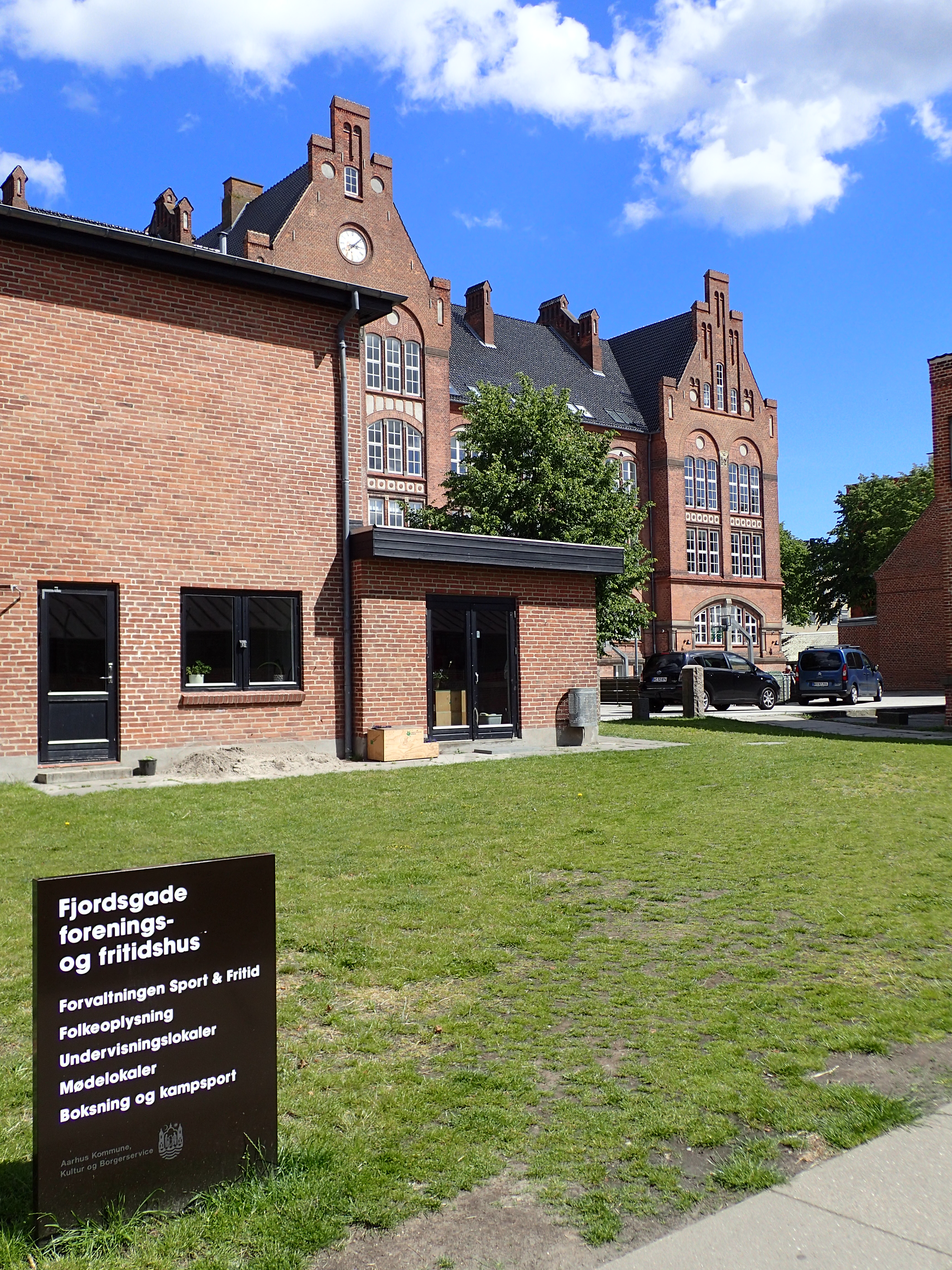 Fjordsgade forenings- og fritidshus.